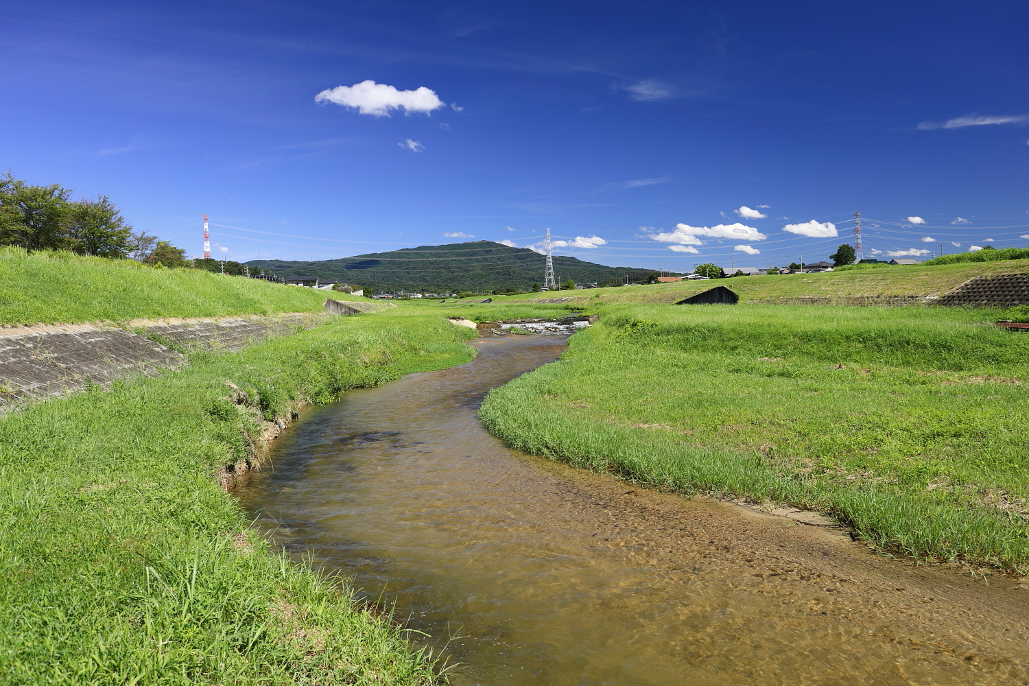 籠川と猿投山（豊田市亀首町、2019年（令和元年）9月）